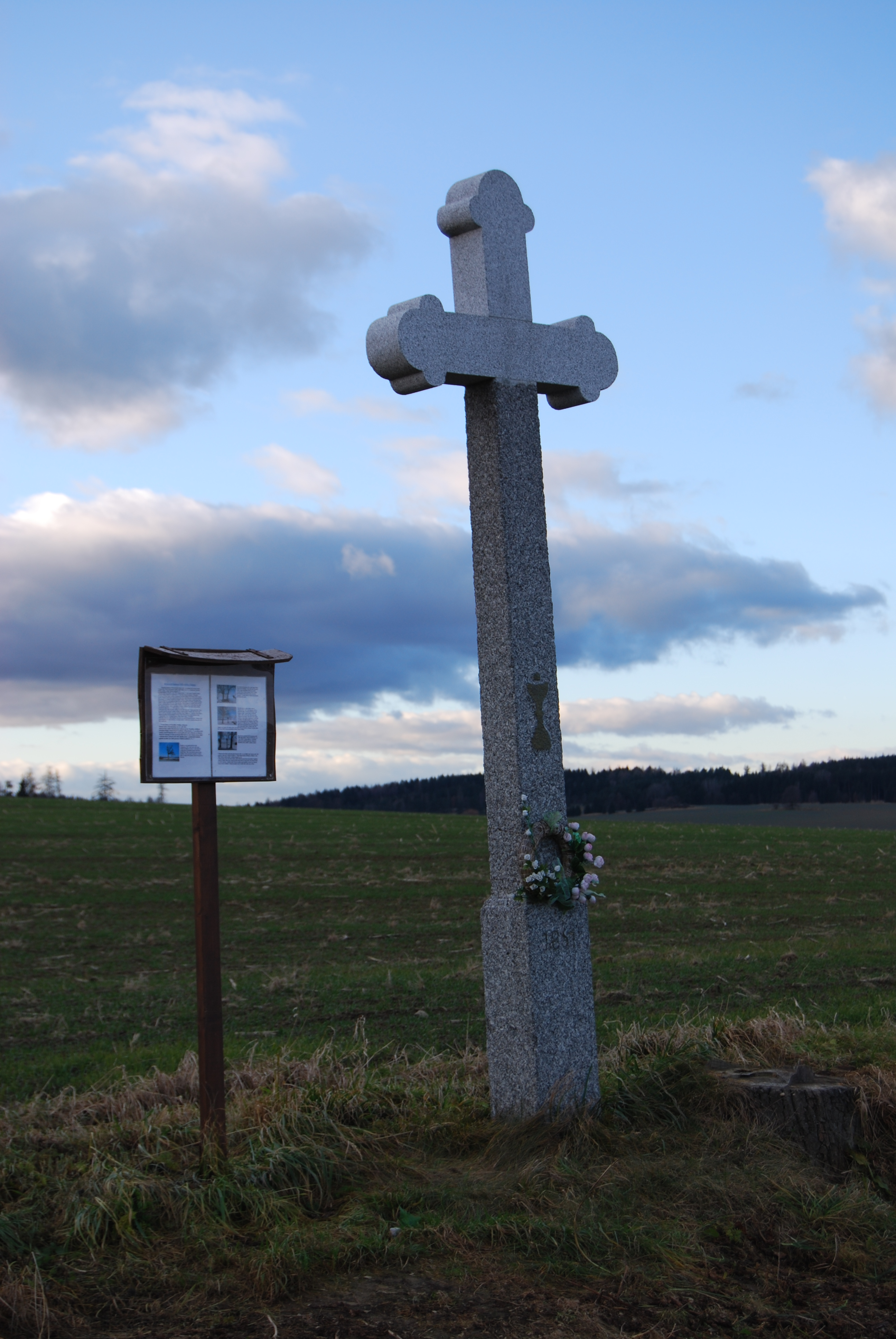 První Kašparův kříž z roku 1851. Křenovice. Okres Písek. Česká republika.